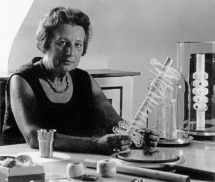 Prof. Hanne-Nüte Kämmerer (1903 bis 1981): Sie legte mit Weitblick und Optimismus den Grundstein der Westfalenstoffe.